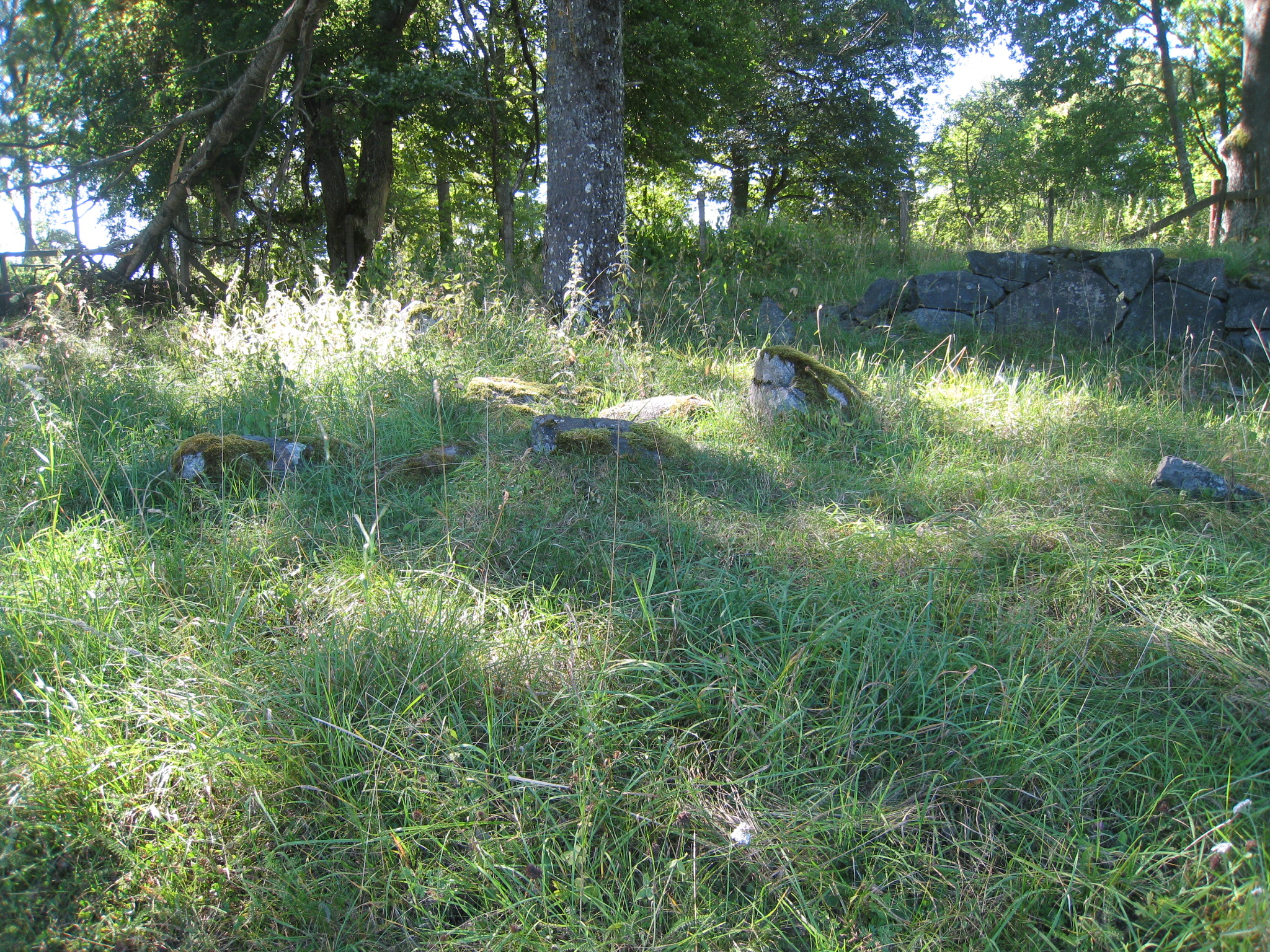 Husgrund till Kallbrunna skogvaktarboställe i Hummelmora hage i Görvälns naturreservat, Järfälla kommun.